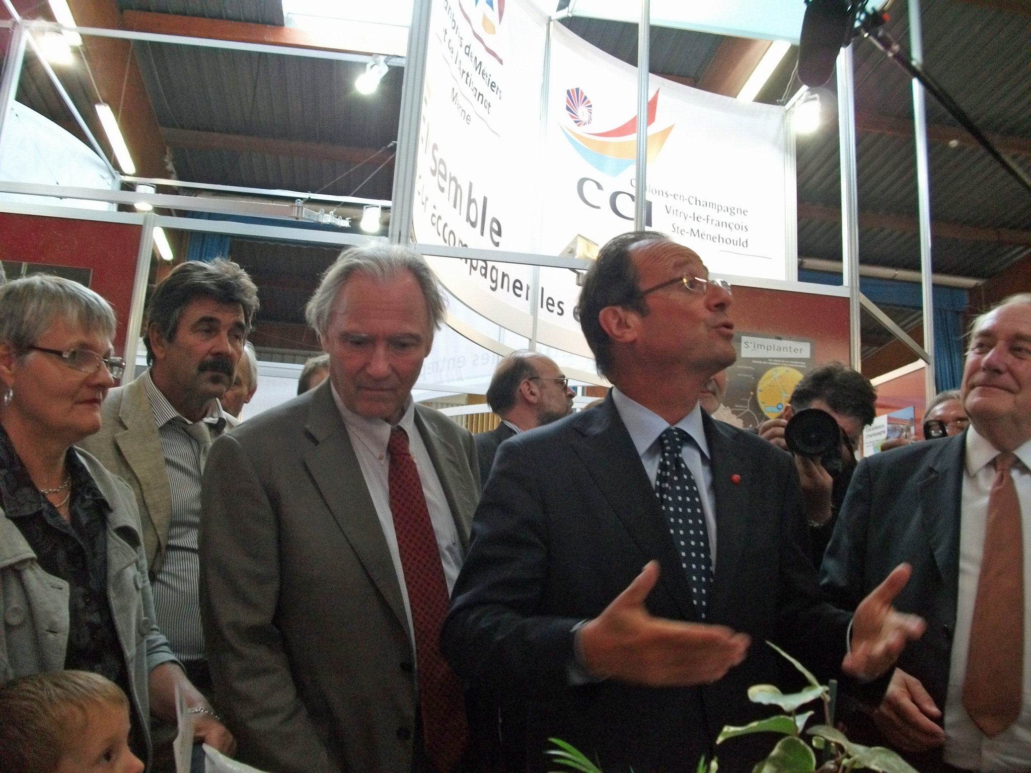 François Hollae invité de Jean-Paul Bachy lors du salon de chalons en 2011.